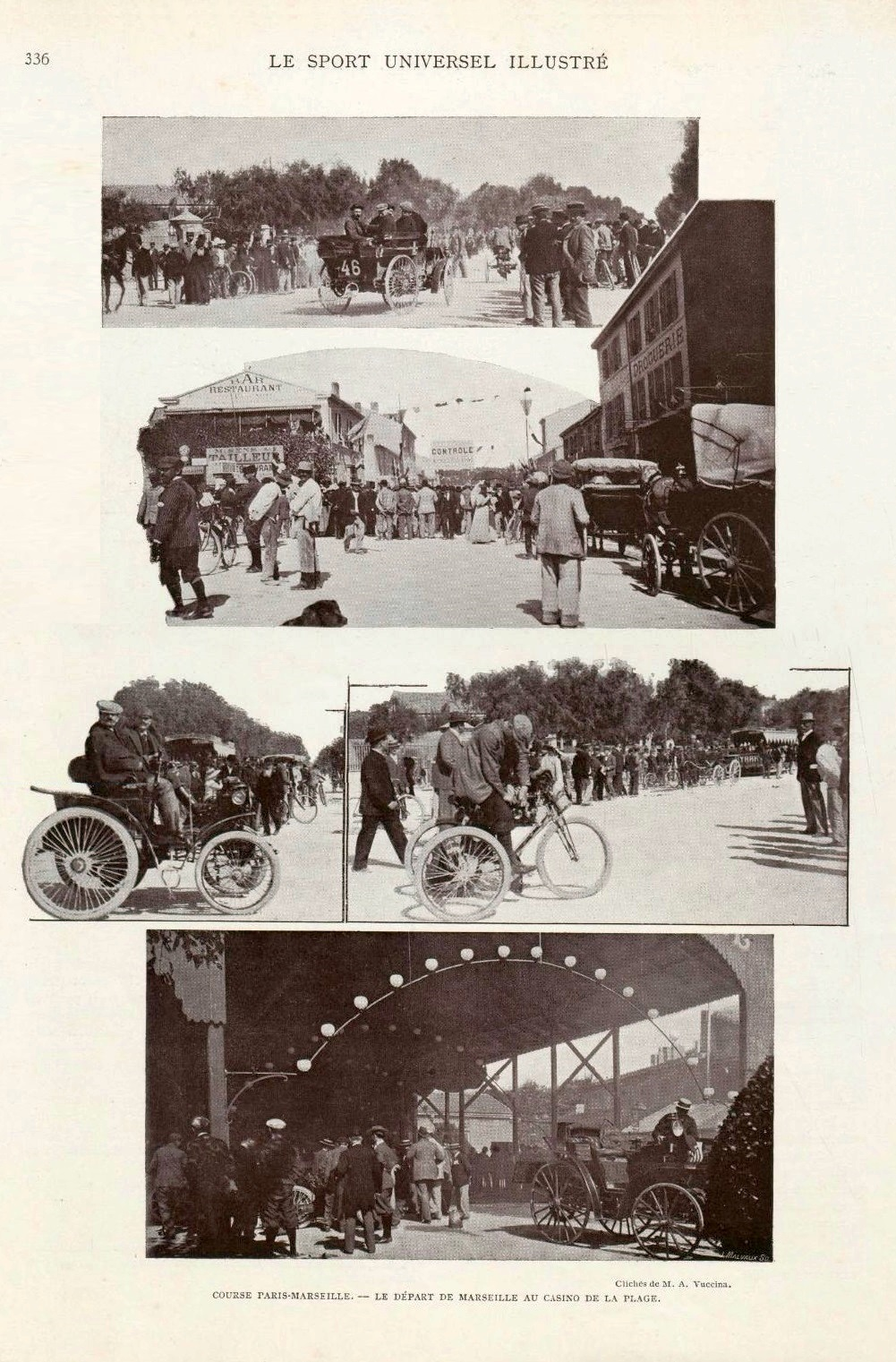 Paris-Marseille-Paris 1896 - départ de Marseille (casino de la Plage) - Le Sport universel illustré du 15 octobre 1896, p.336